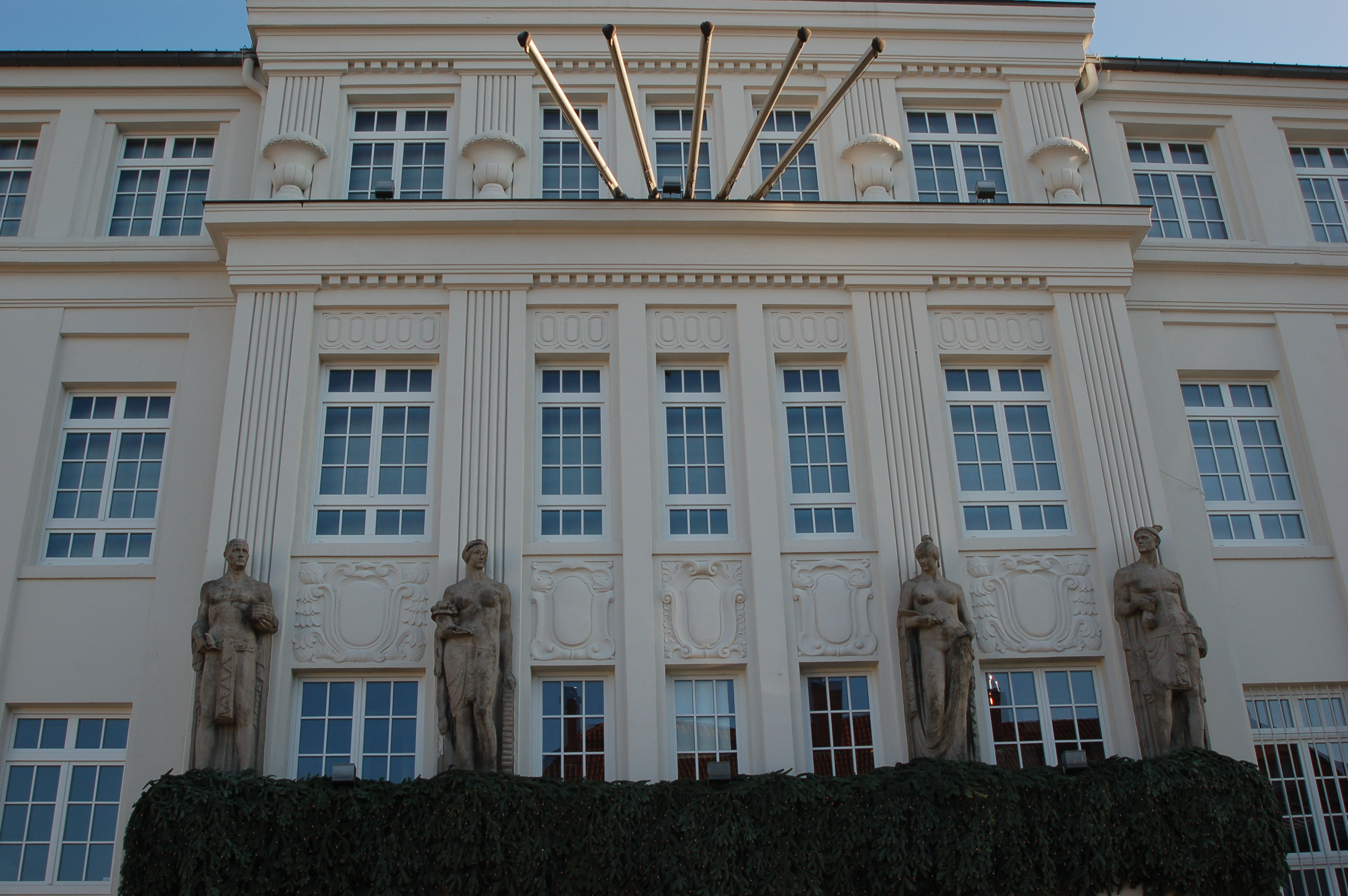 Front des "Neuffer am Park" mit Schuhmacher, Demeter, Aphrodite und Hermes